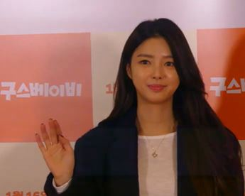 1월 2일 오후 서울시 광진구 자양동 롯데시네마 건대입구에서 영화 ‘구스 베이비’ VIP시사회가 열렸다.